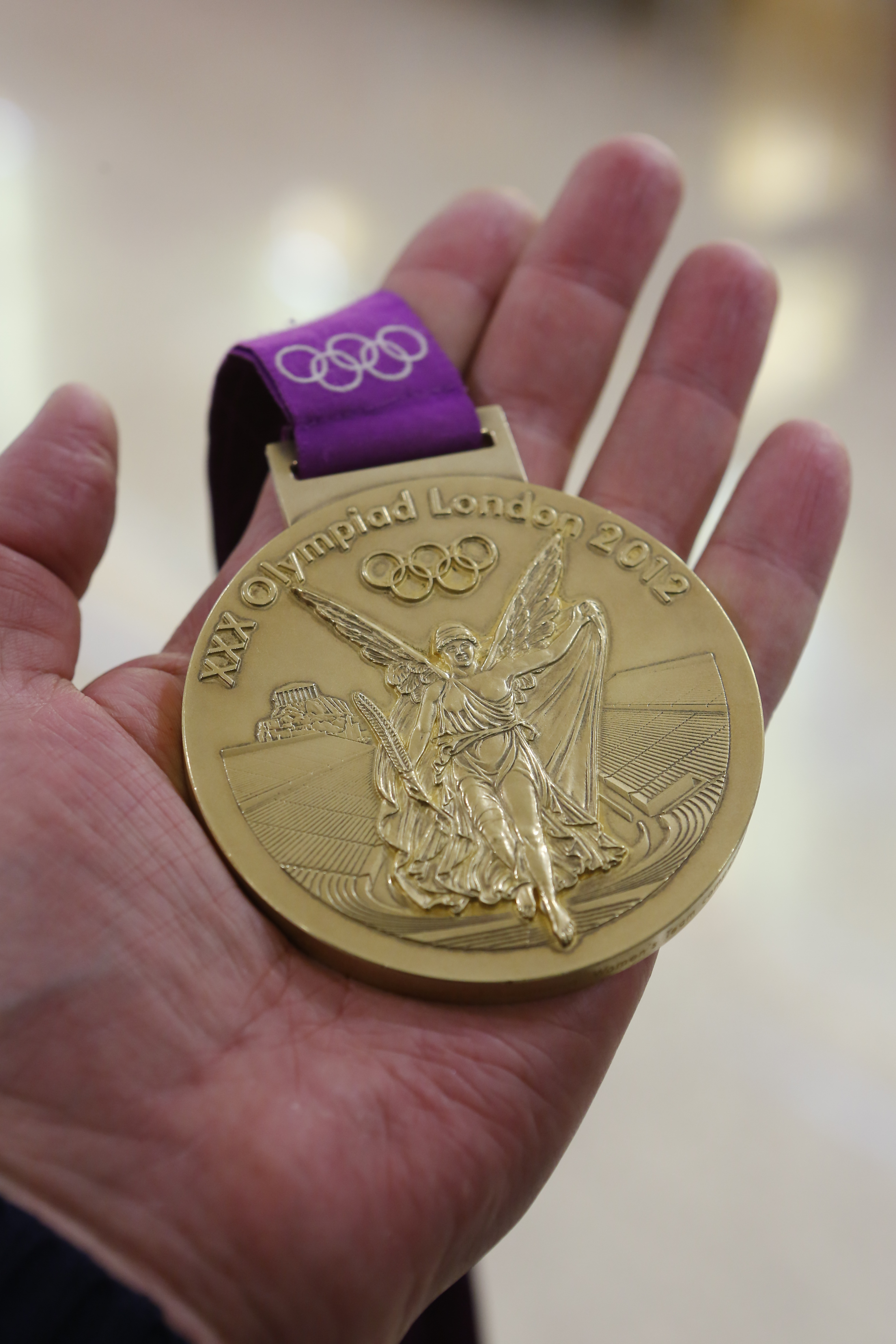 Верхняя Пышма. Музей УГМК. Золотая медаль синхронистки Анжелики Тиманиной с Лондонской олимпиады 2012г . (Оригинал)